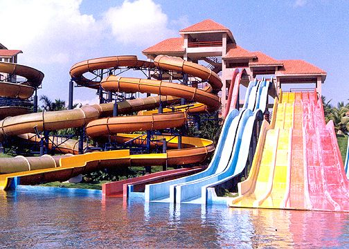 Athisayam water theme park, Madurai,Tamilnadu,India